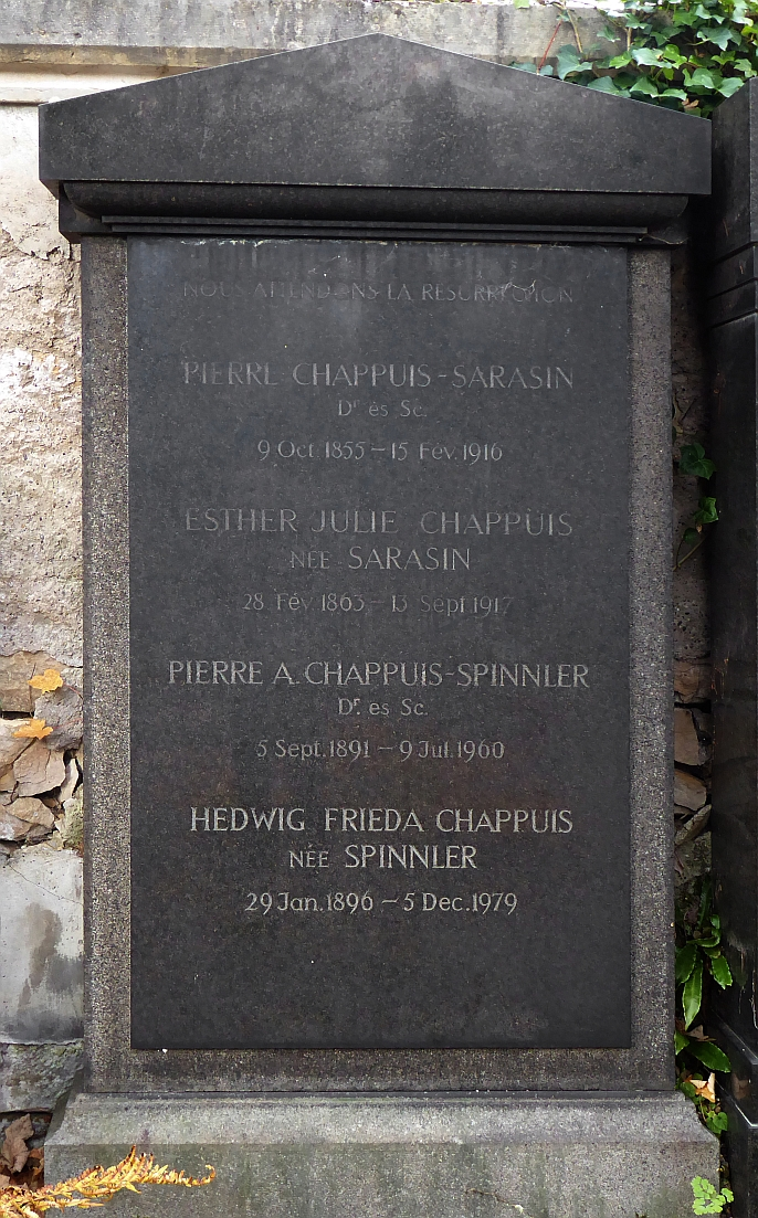 Pierre Alfred Chappius-Spinnler (1891–1960) Tombeau au cimetière Wolf Stadtgottesacker, Bâle